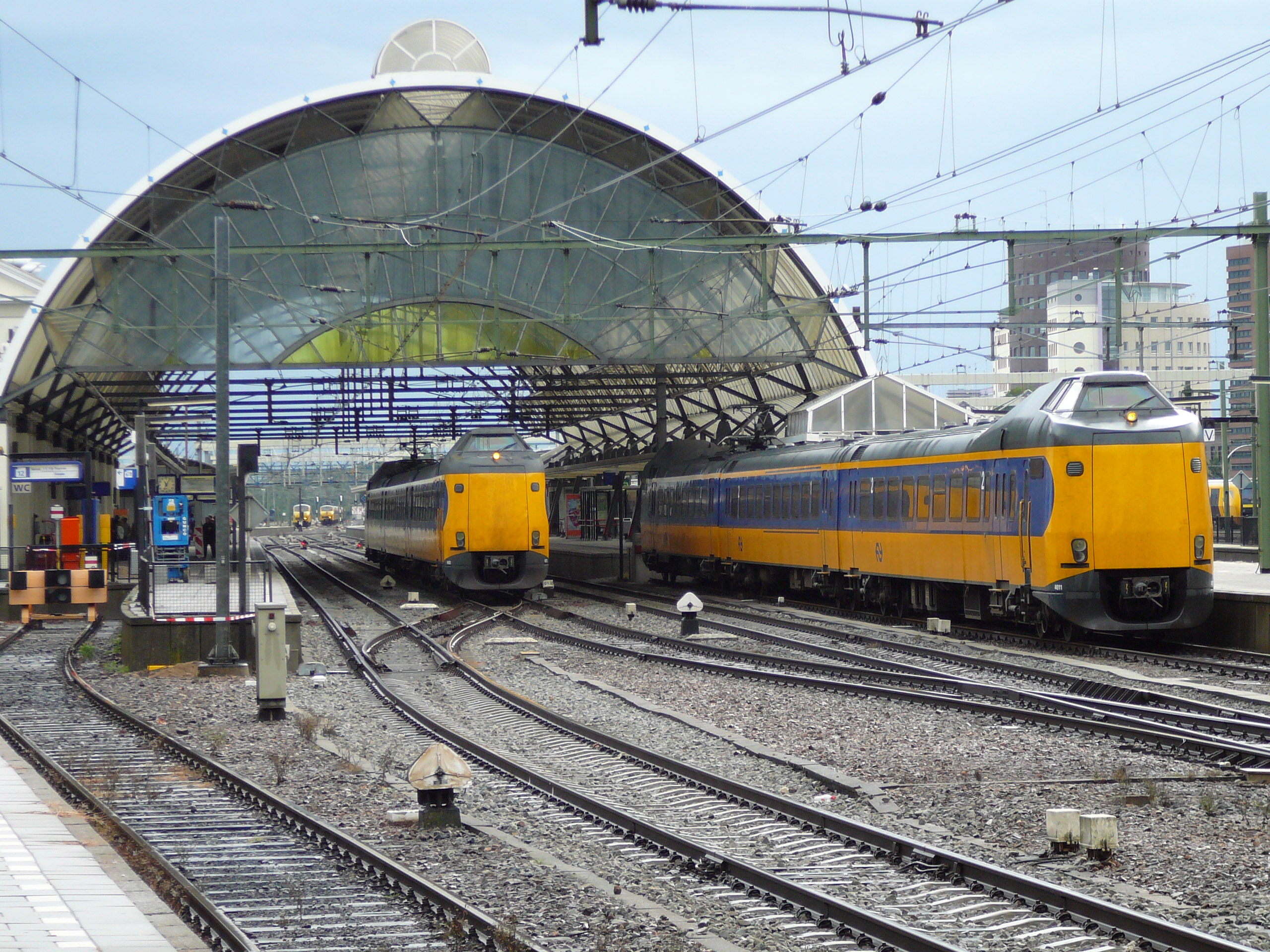 Koplopers 4011 & 4012 in Zwolle